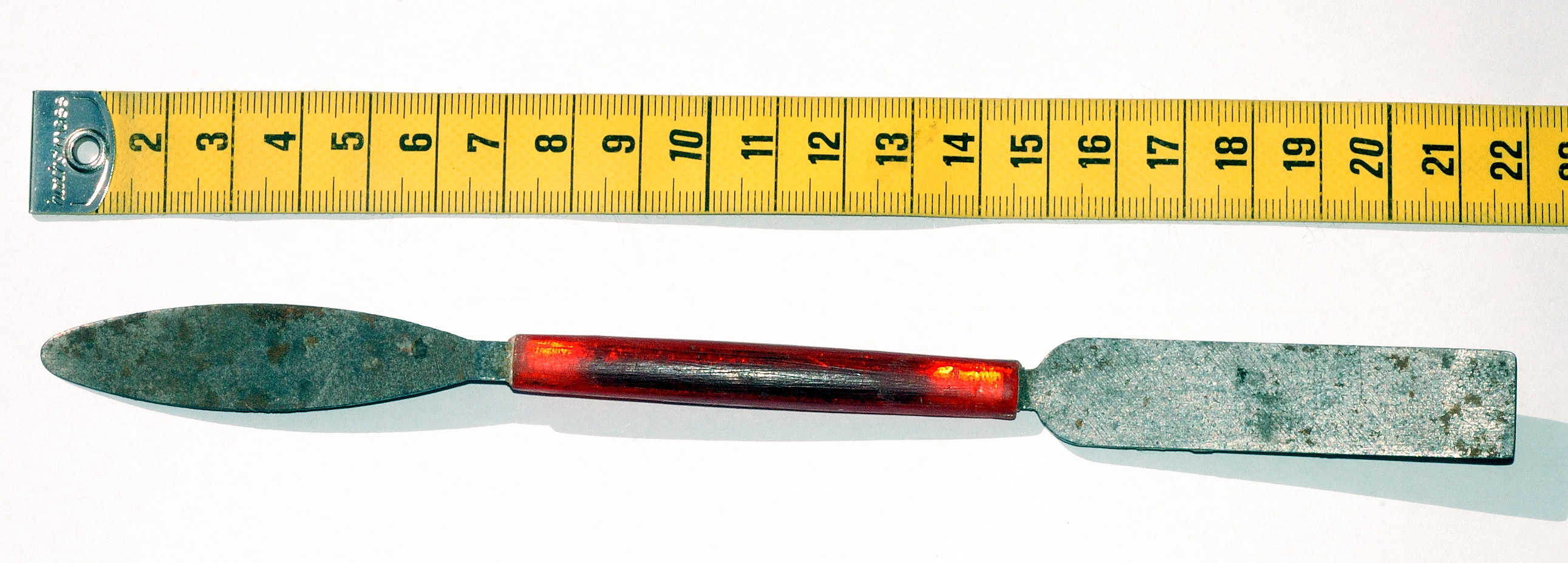 Stuckateureisen, mittel